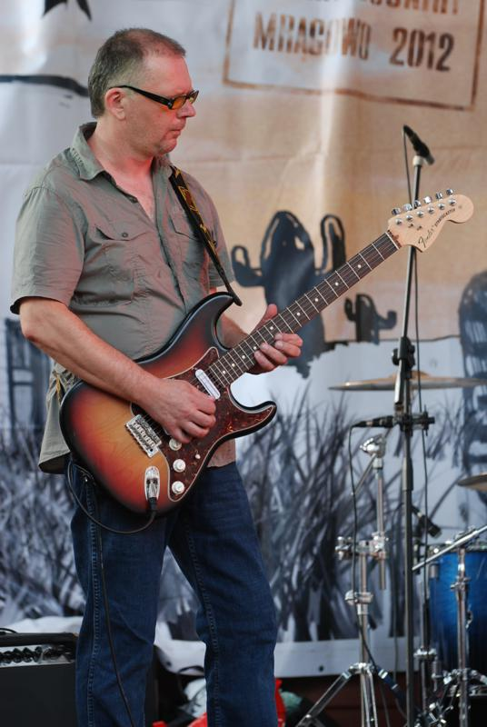 Piotr Szymański na Pikniku Country w Mrągowie